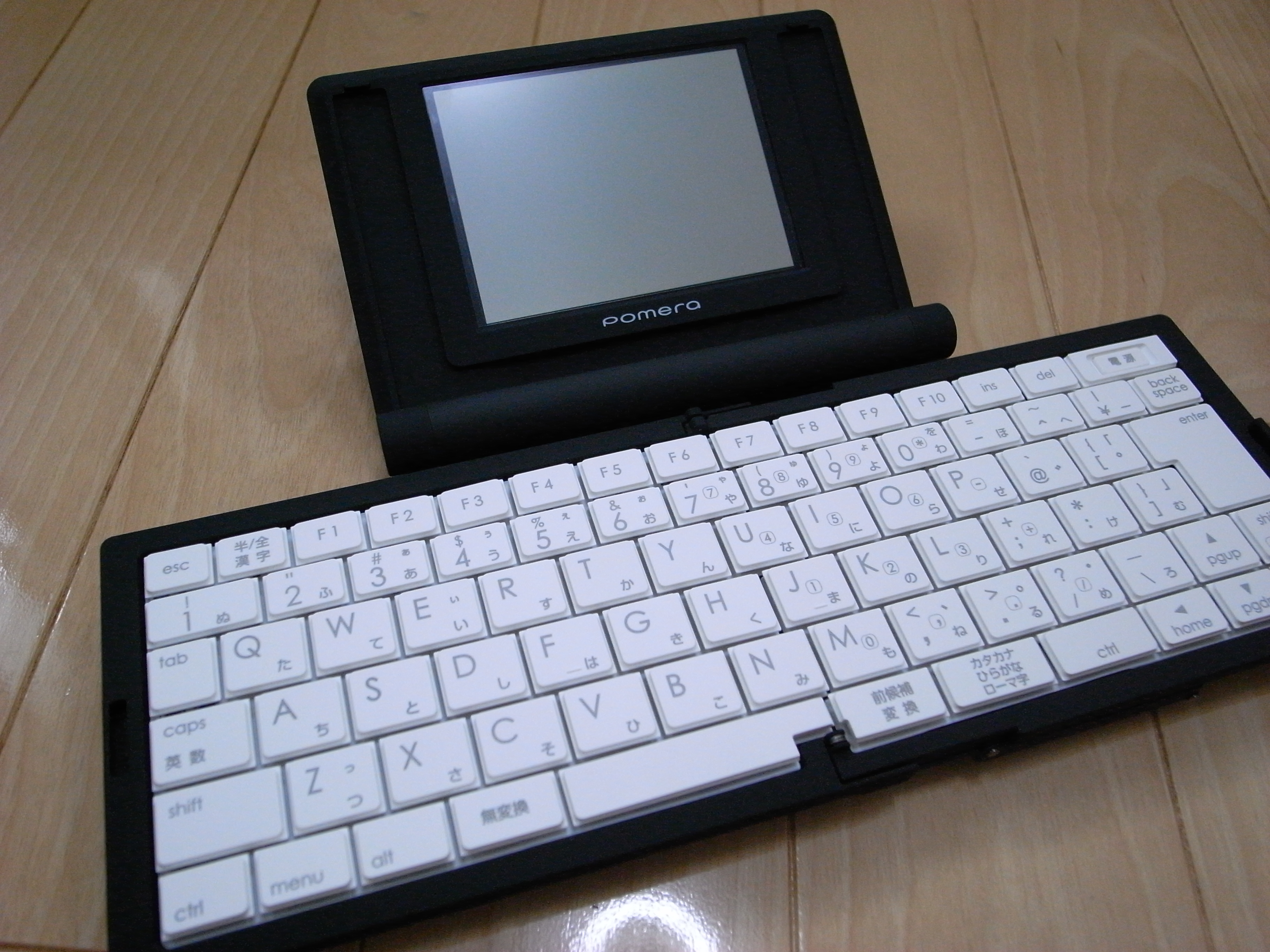 ポメラの限定カラー「レーシングシルバー」